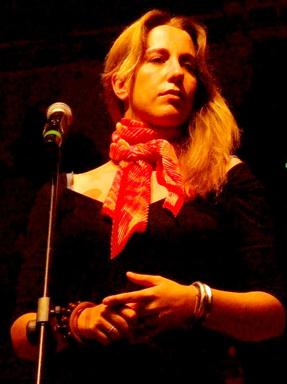 Ginevra di Marco in concert at Arona